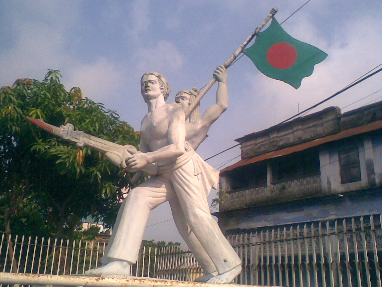 “স্বাধীনতা” ভাষ্কর্য